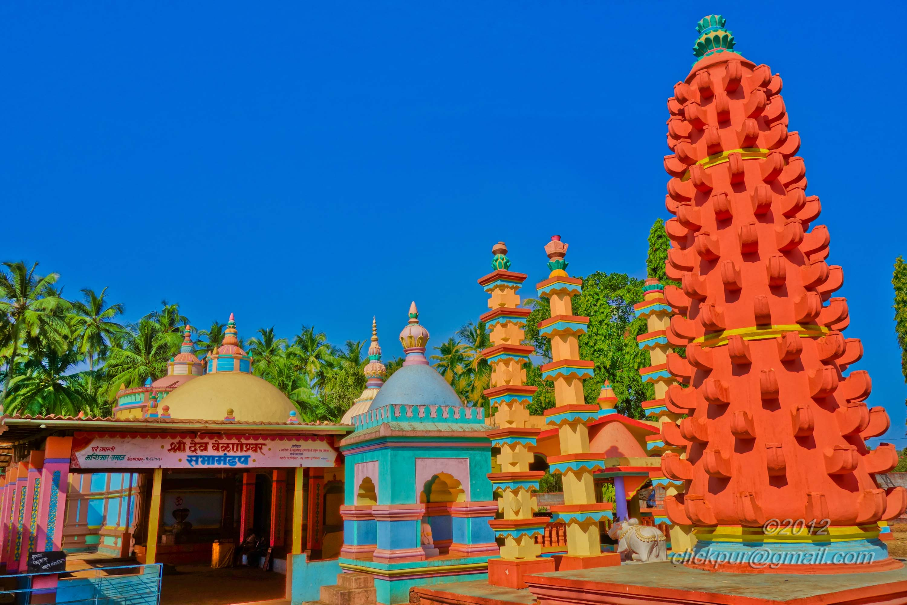 Ratnagiri, Velneshwar